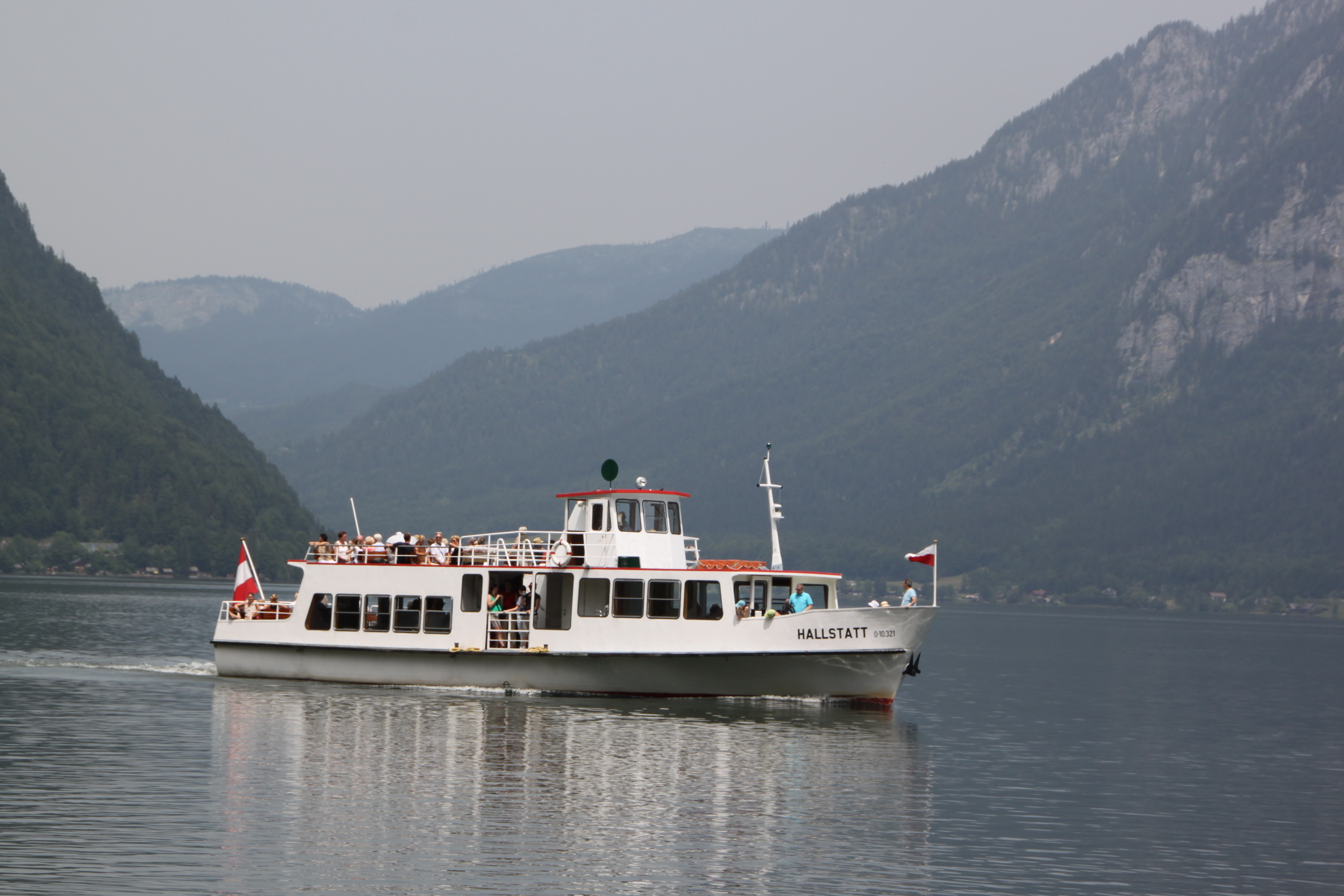 Hallstatt, Austria